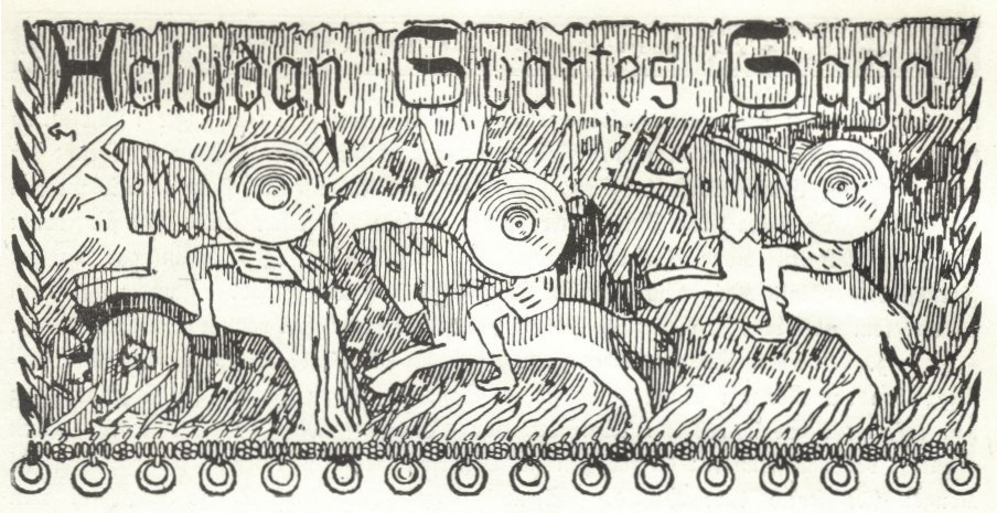 Gerhard Munthe: Illustration for Halvdan Svartes saga, Heimskringla 1899-edition. Tittelfrise.